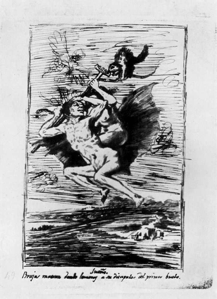 Dibujo preparatorio del capricho nª 66.